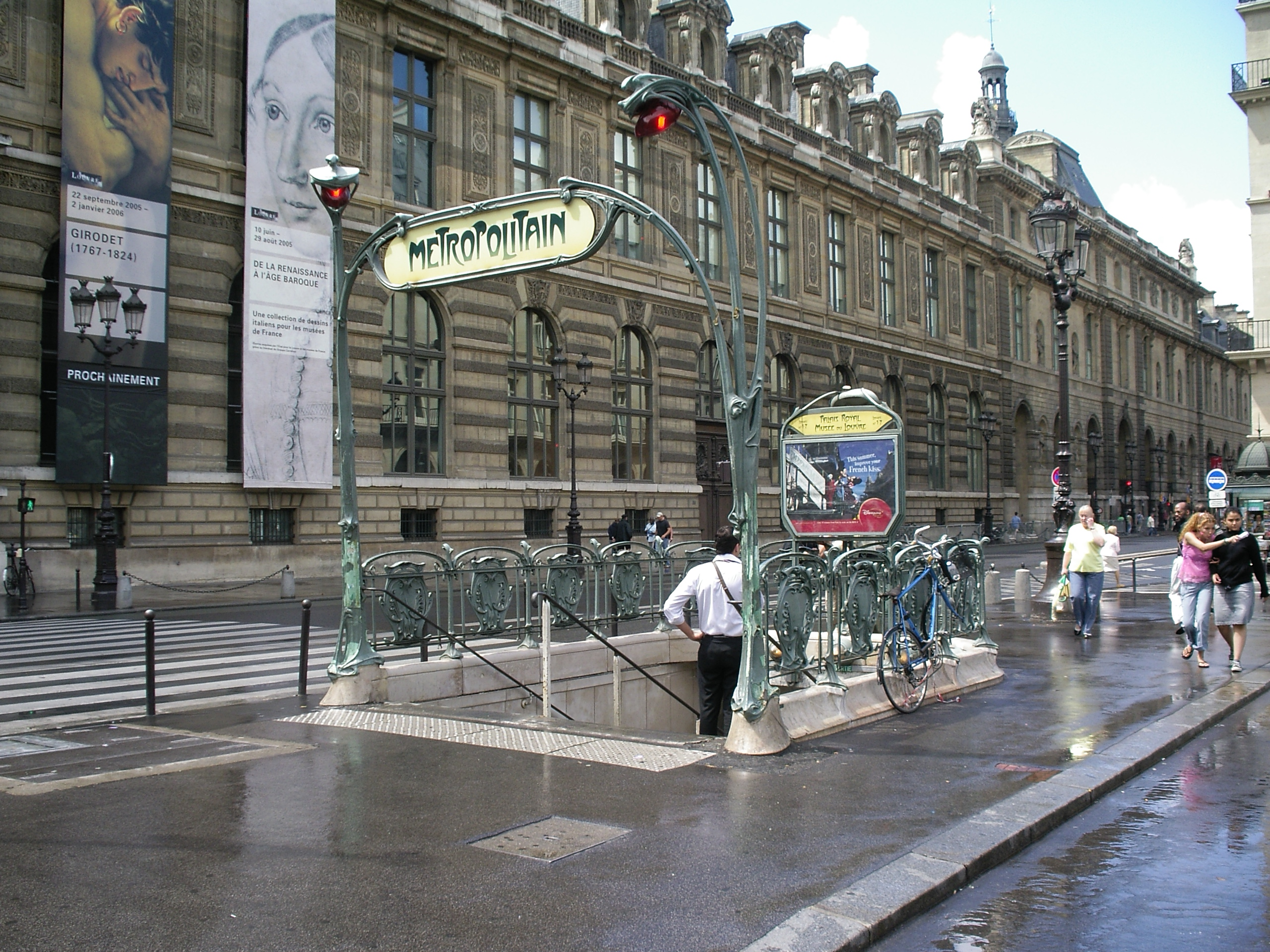 zelfgemaakte foto